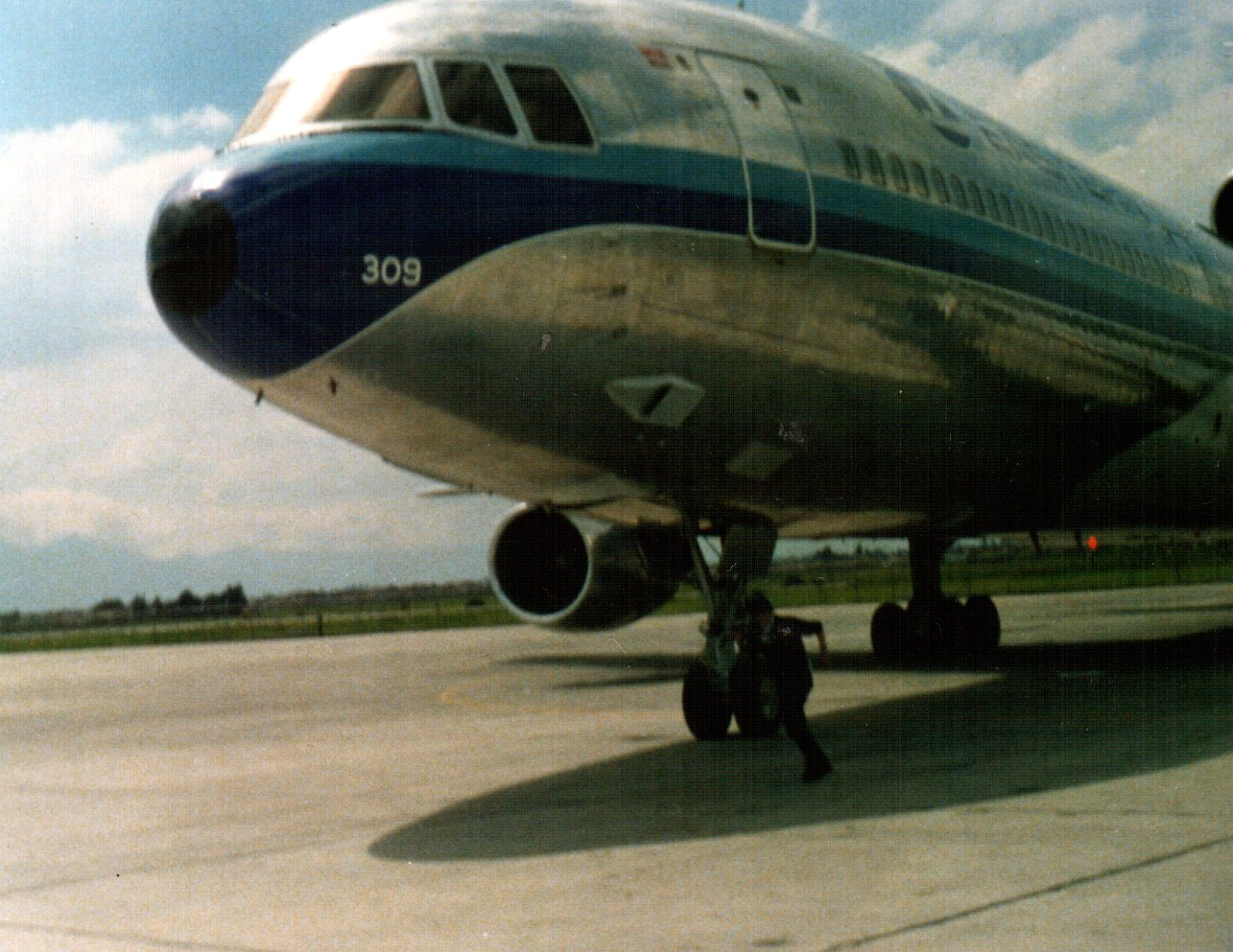 L-1011 EN EL MOMENTO DE SER DESPACHADO LUEGO DEL PUSBACK CON DESTINO A MIAMI.